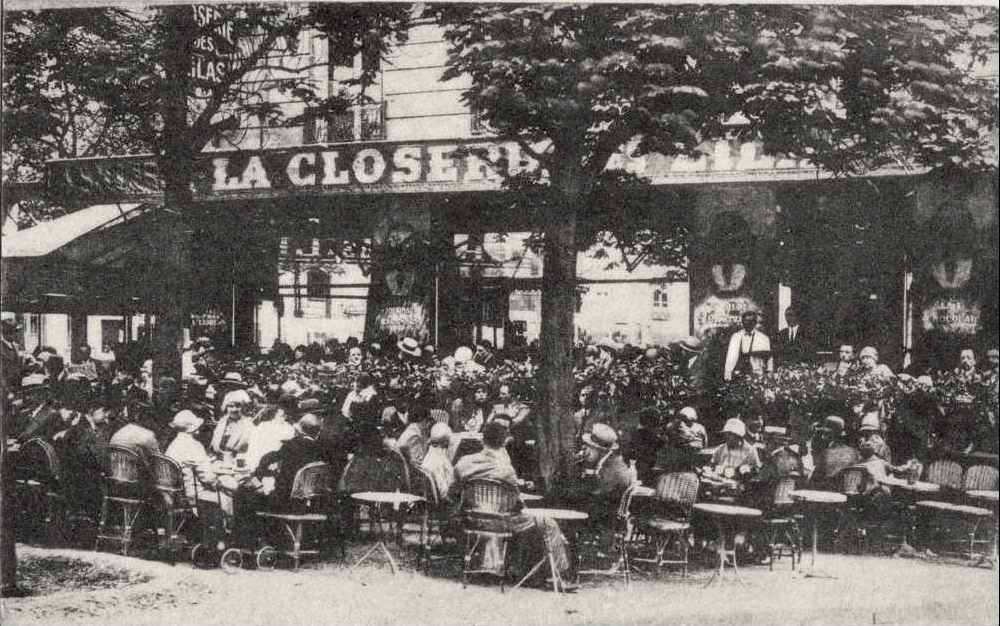 La Closerie des Lilas (fr), Le Café de la Société Artistique et Littéraire Française et Etrangère, 171, Boulevard de Montparnasse, Paris, 1909